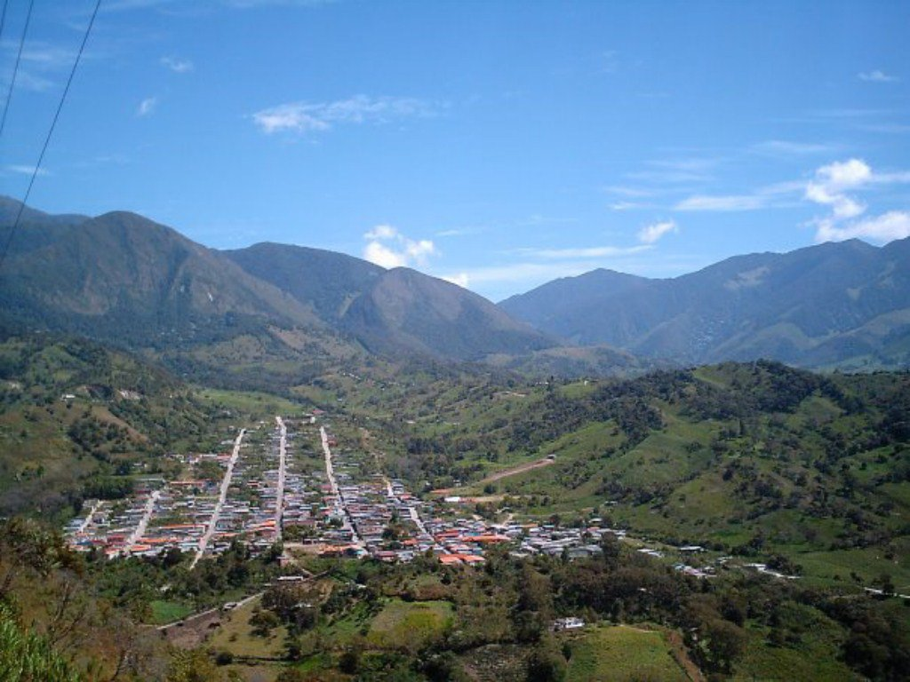 SJB-táchira